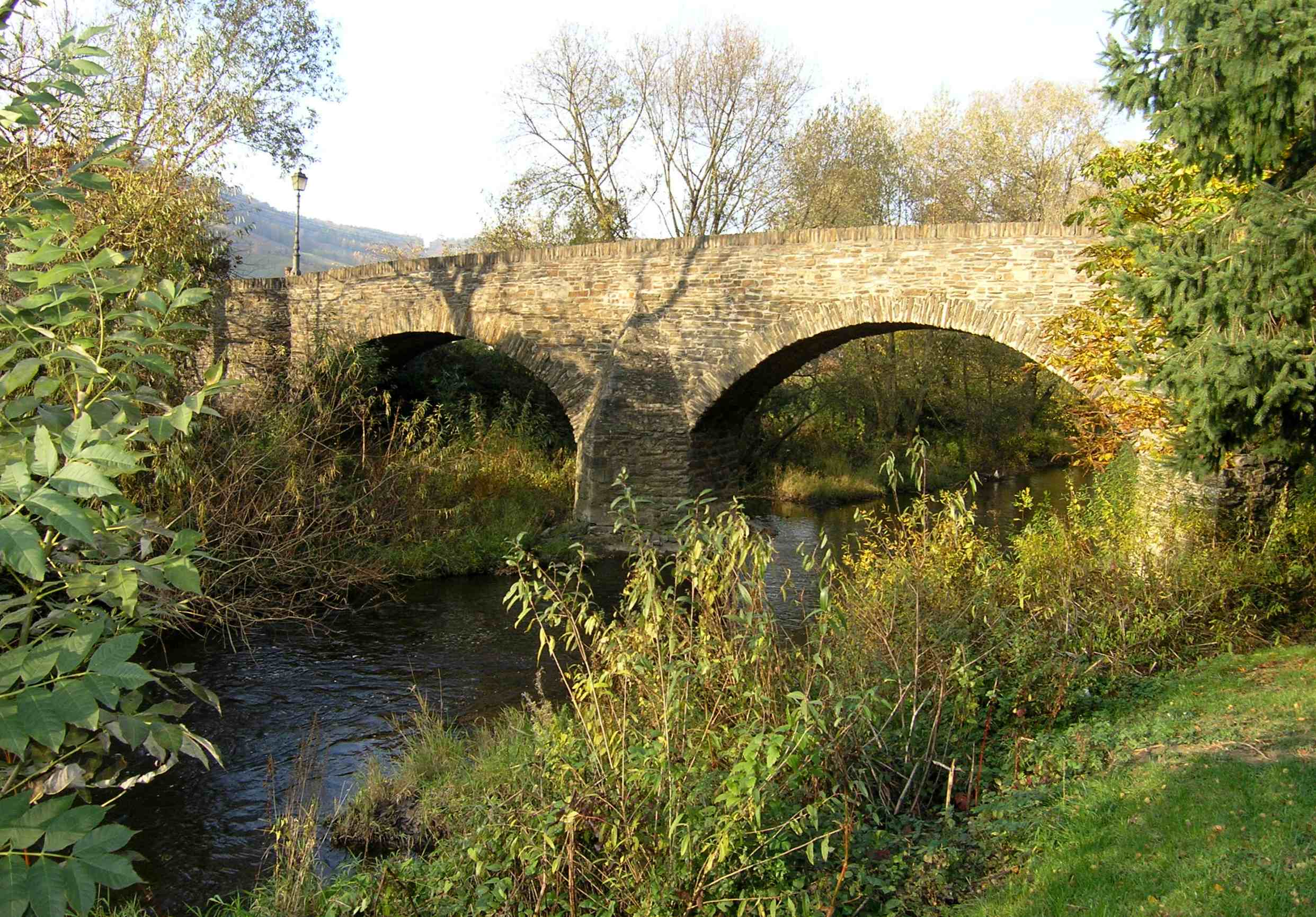 Ahr-Brücke Dernau